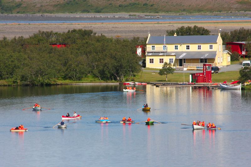 Sumarbúðirnar við Ástjörn